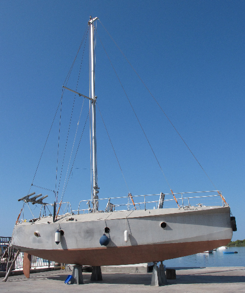 Orso Bianco a Frikes (Grecia 2015)